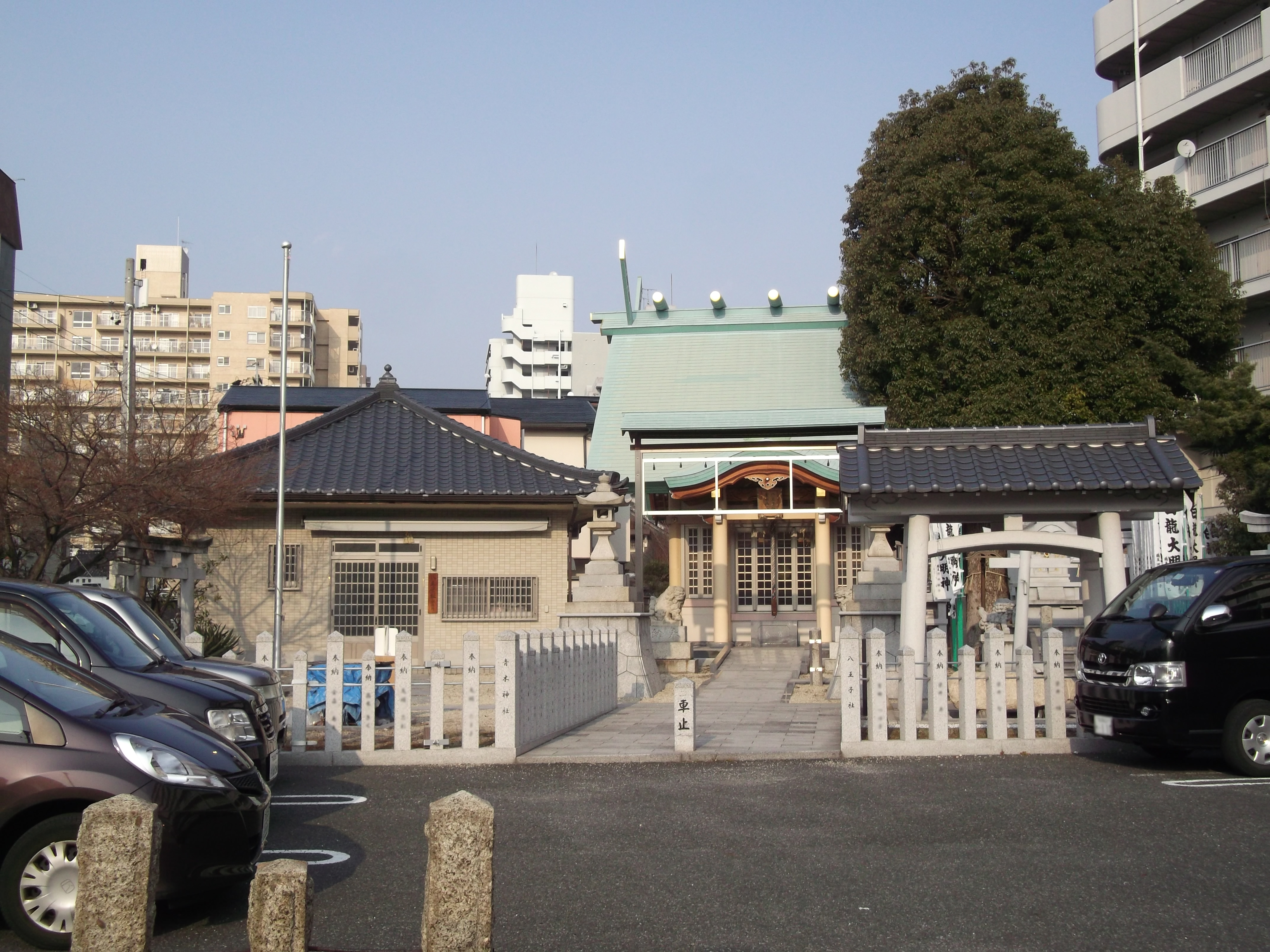 名古屋市中区新栄の八王子神社を南側公道より撮影（ナンバープレート・個人名につき、プライバシー保護を目的とした画像修正済）